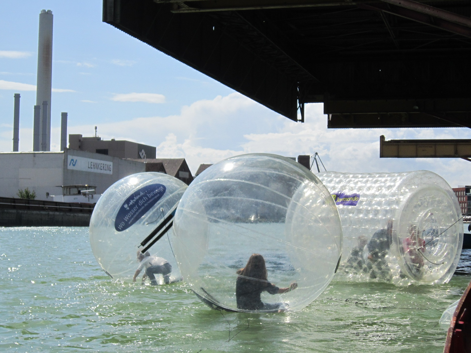 Hafenfest im Münsteraner Stadthafen